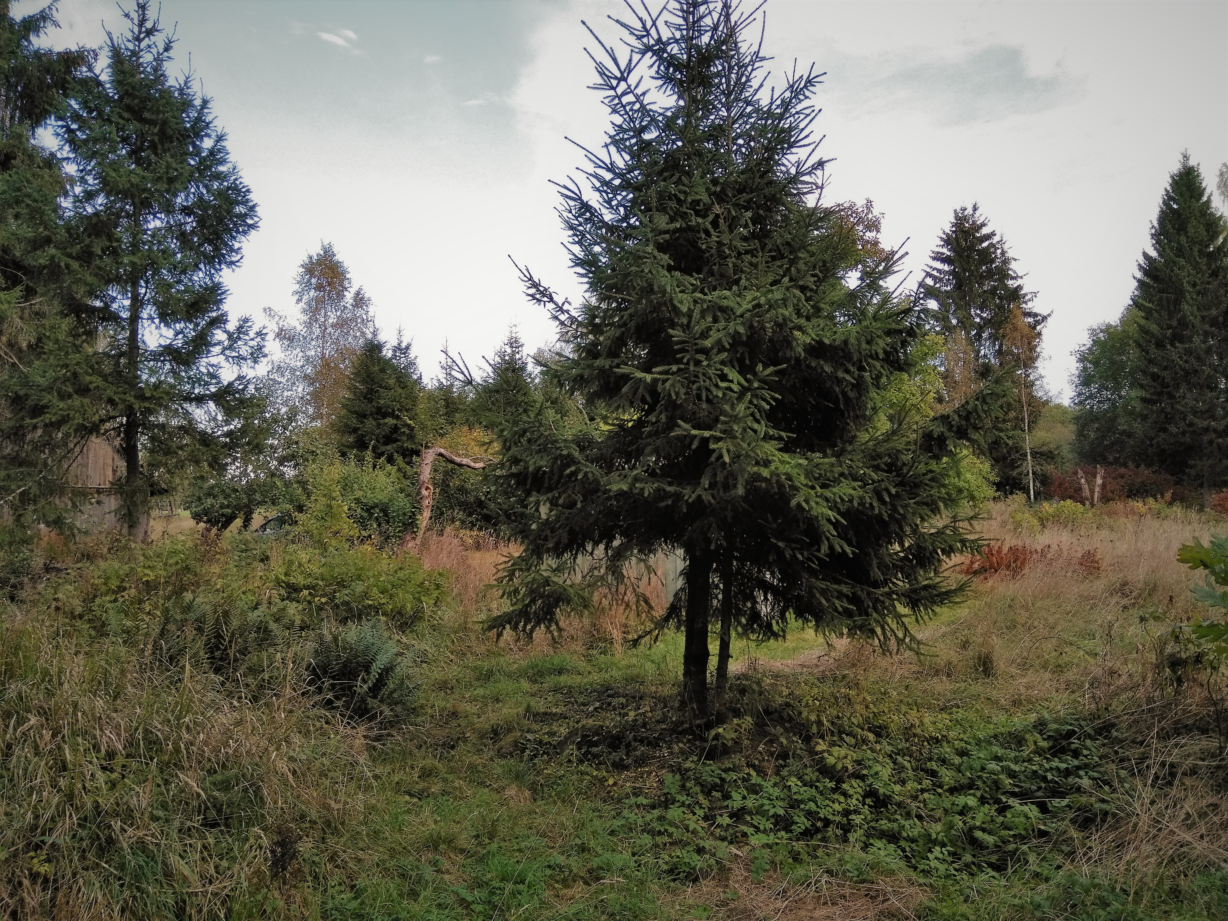 Algselt hekikuuskede reas olnud paarikümneaastane puu hakkab latiikka jõudma. Kuusk on väga elujõuline, kui tema koort ei vigastata ja normaalsete kasvuolude korral tõrjub teised puuliigid (eriti lehtpuud) välja või tagaplaanile.